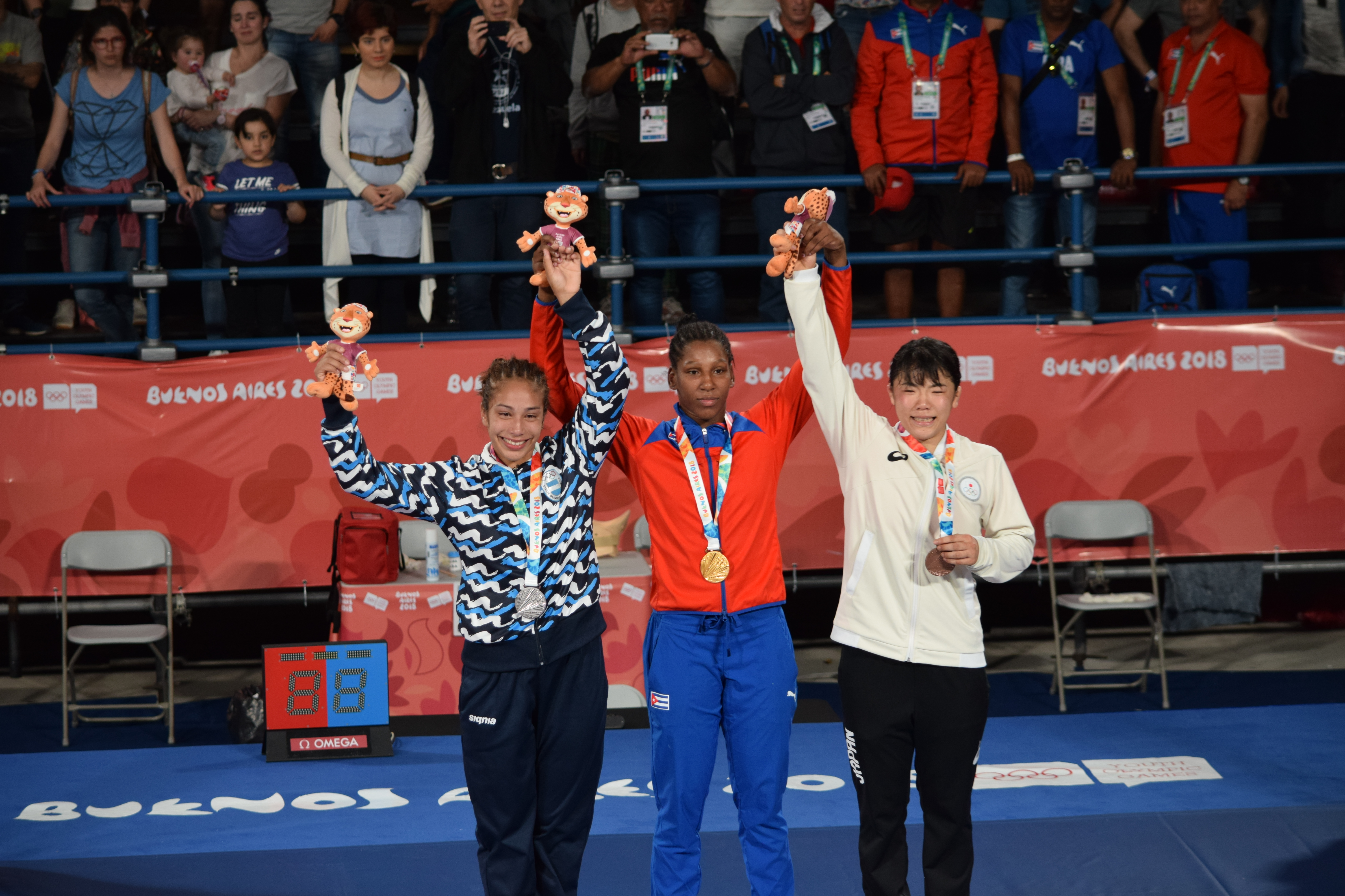 Ceremonia de premiación durante los Juegos Olímpicos de la Juventud 2018 en Buenos Aires. Noche del 13 de octubre. Milaimys de la Cari MARIN POTRILLE, Linda Marilina MACHUCA y Yuka KAGAMI.